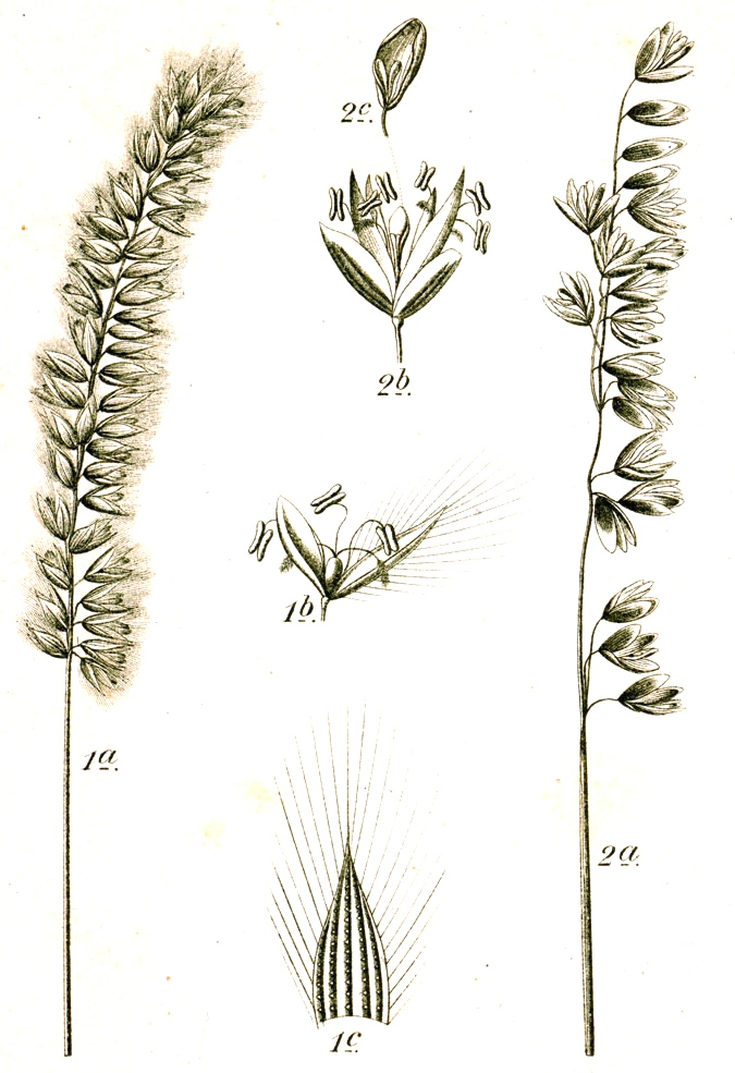 Original Caption 1. Wimper-Perlgras, Melica ciliata L. 2. Nickendes Perlgras, M. nutans L.